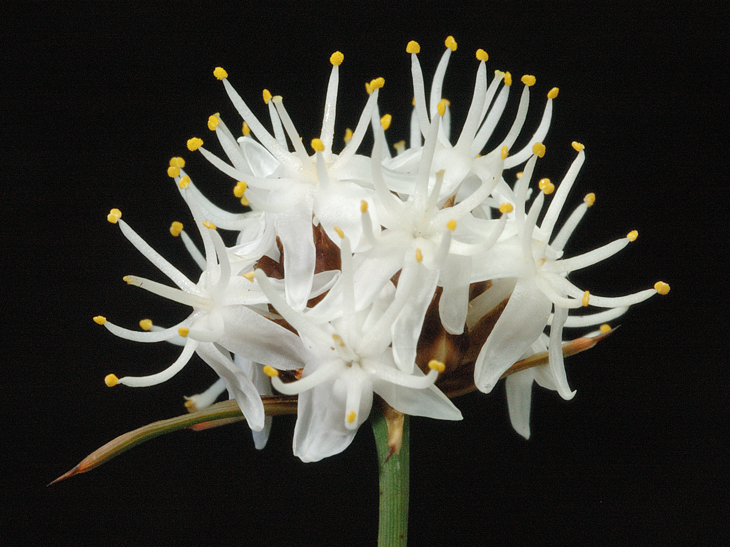 KRT3075